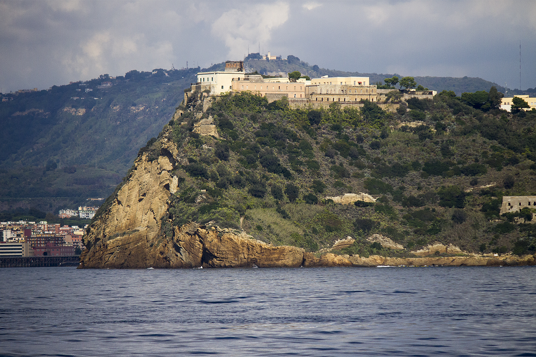 Napoli 3691